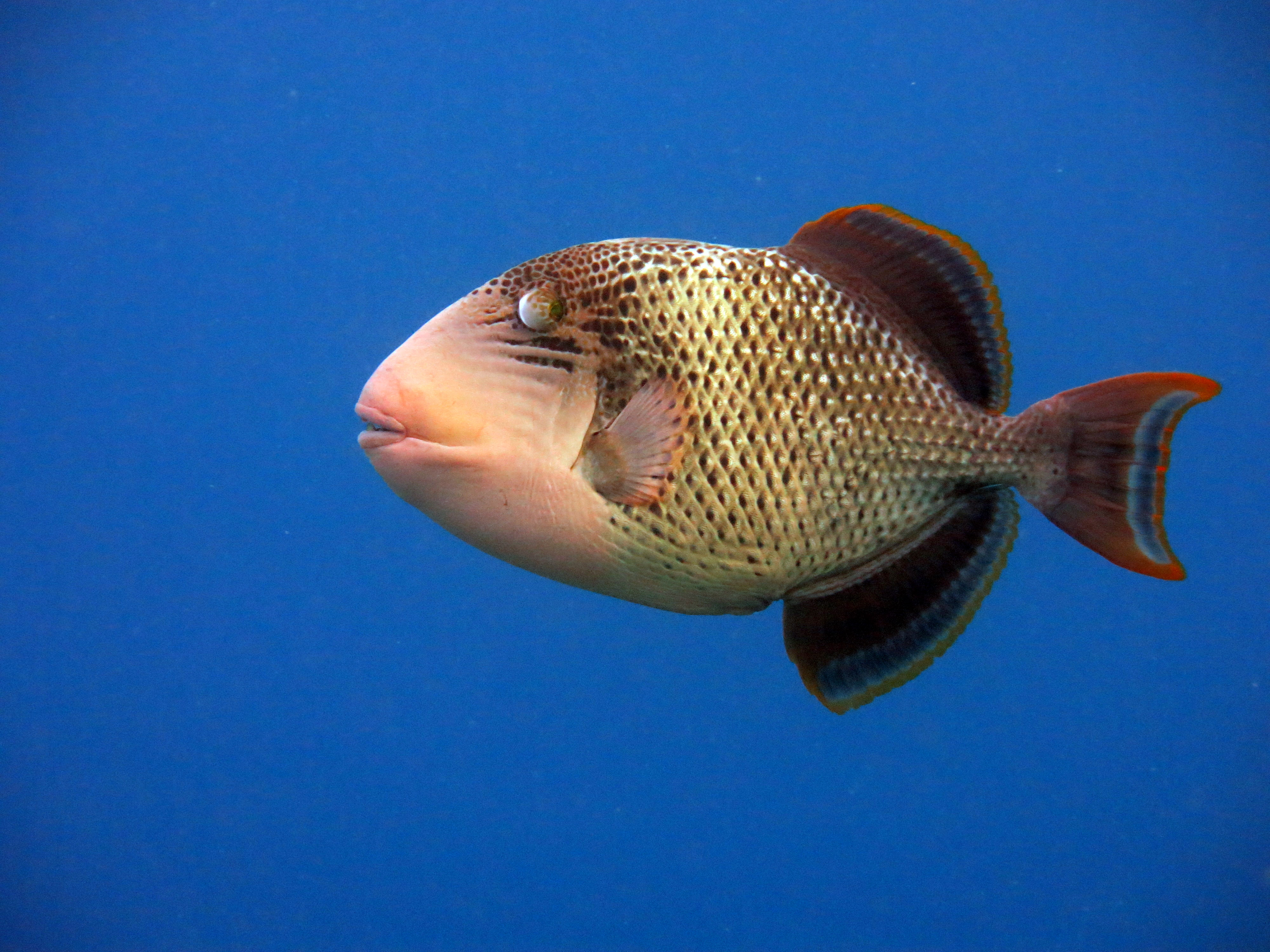 Un poisson-baliste à marges jaunes (Pseudobalistes flavimarginatus) aux Maldives (atoll de Baa).